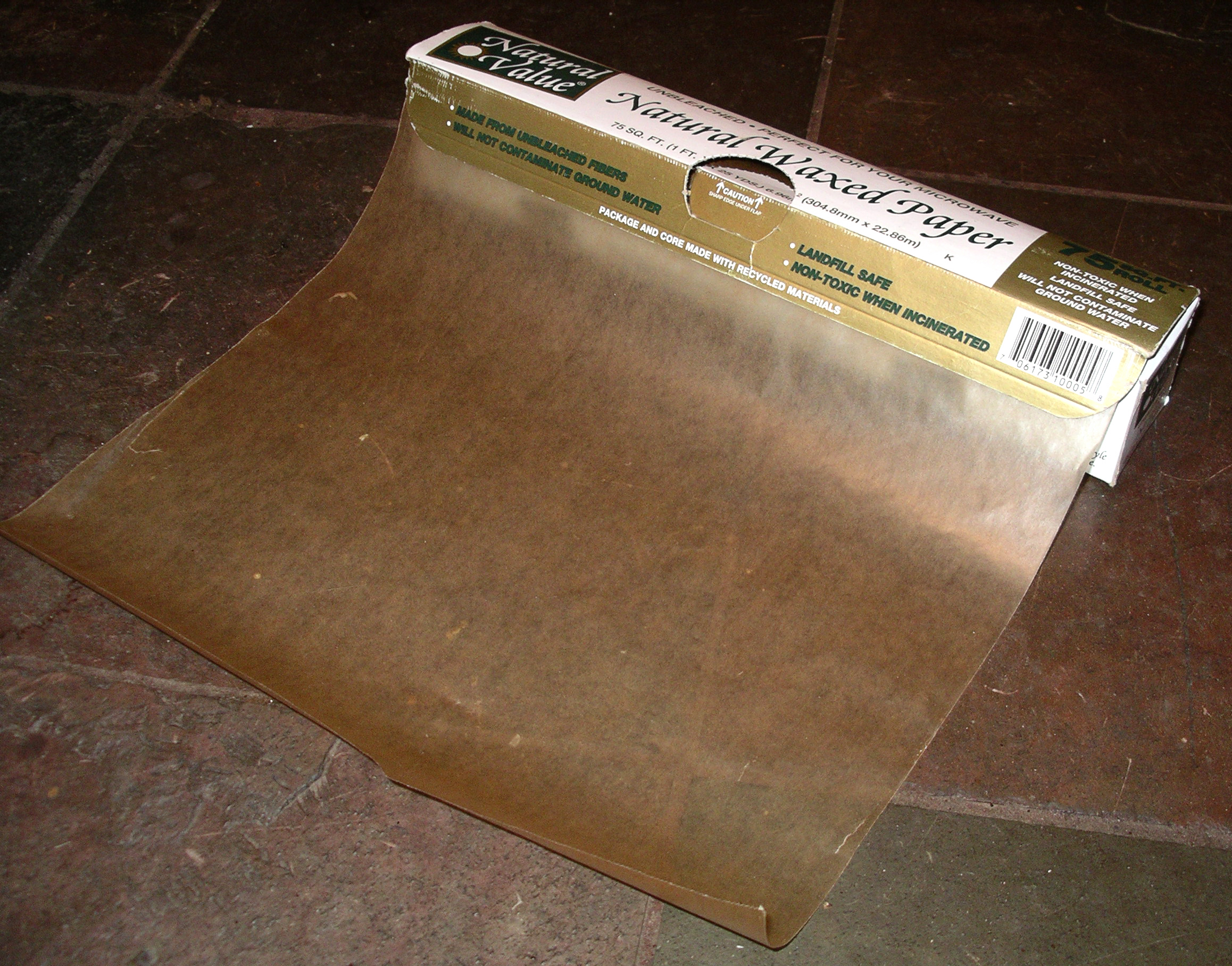 I took it myself.